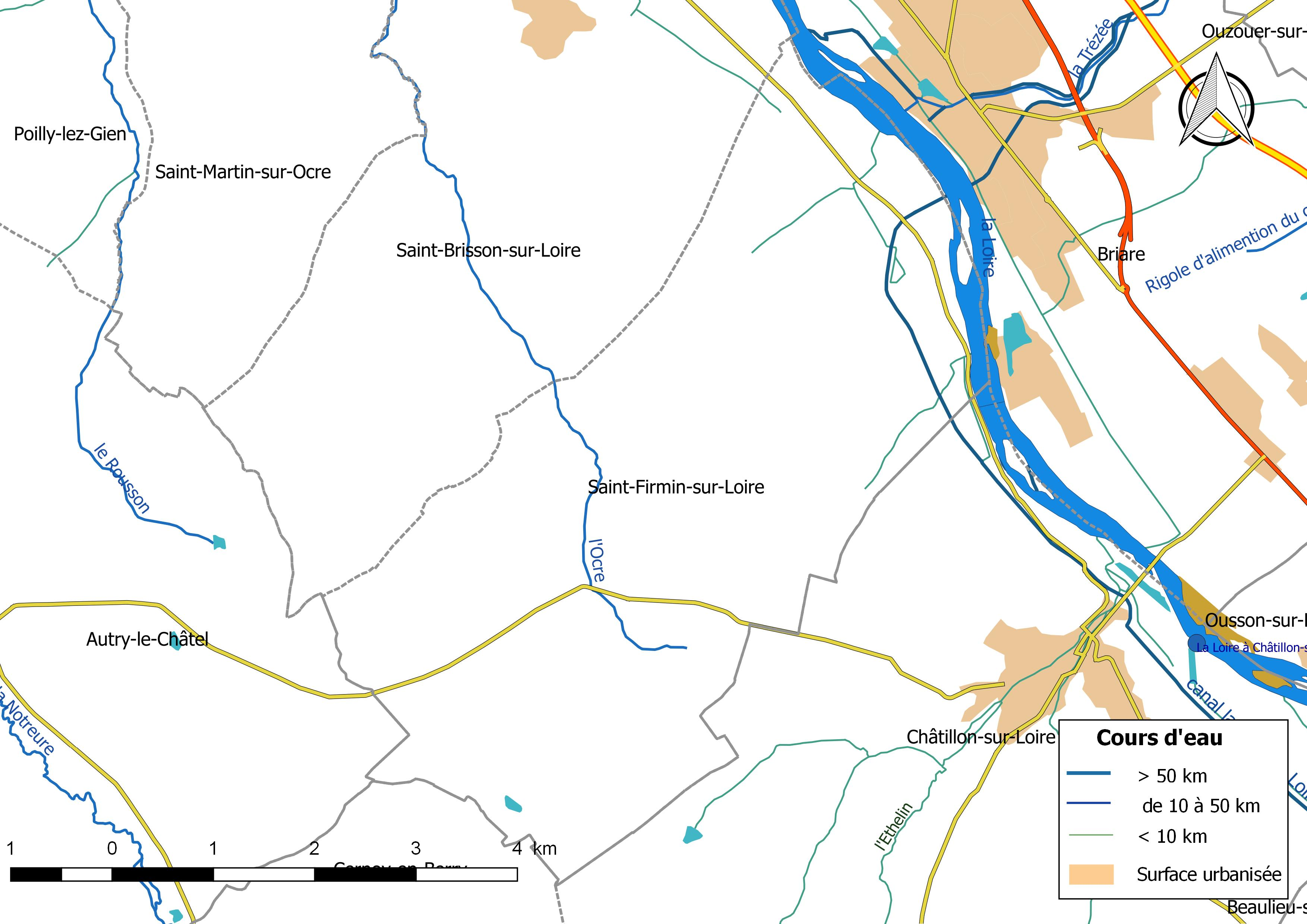 Carte du réseau hydrographique de la commune de Saint-Firmin-sur-Loire (France).